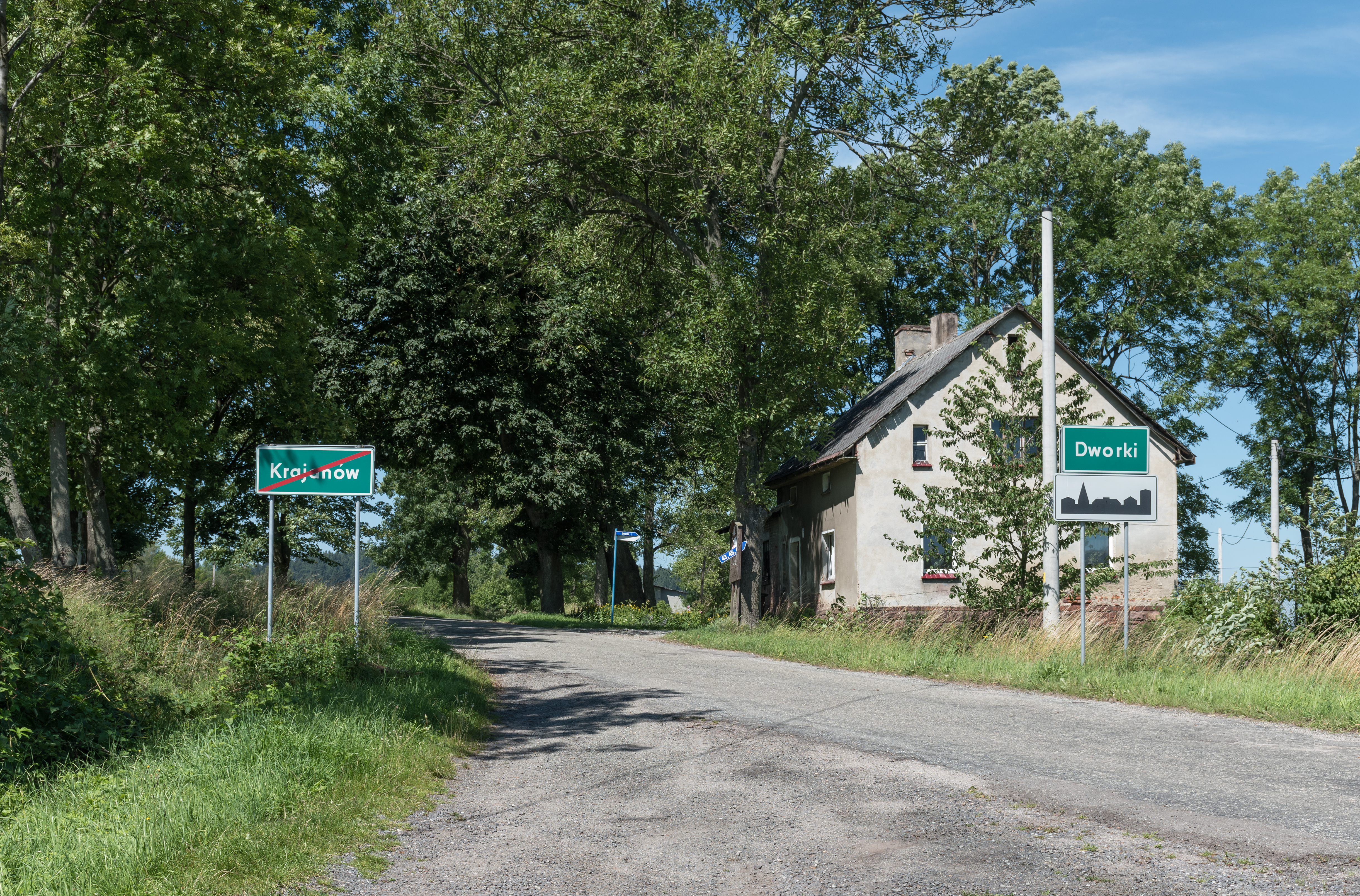 Dworki